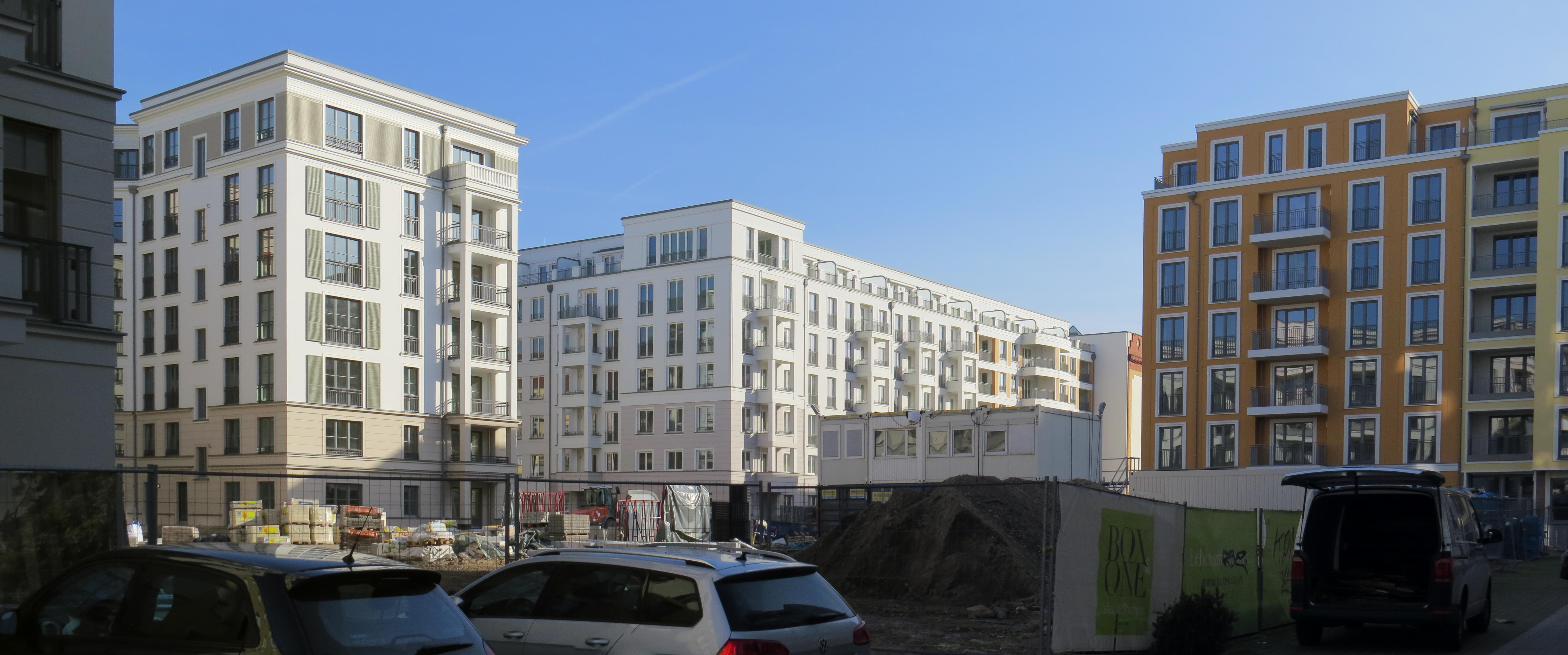 Neues Wohngebiet “Box Seven” in Friedrichshain